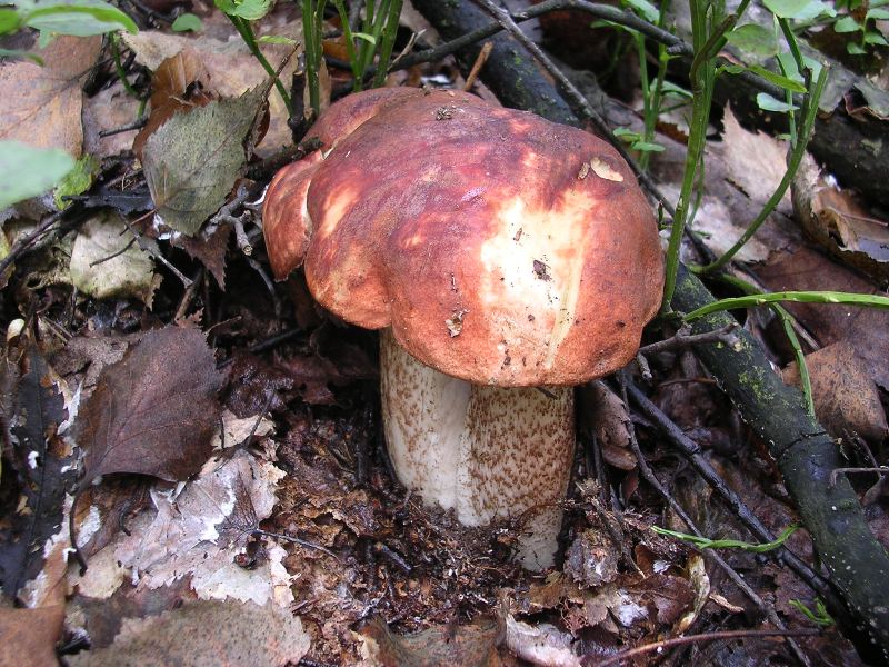 Eichenrotkappe.